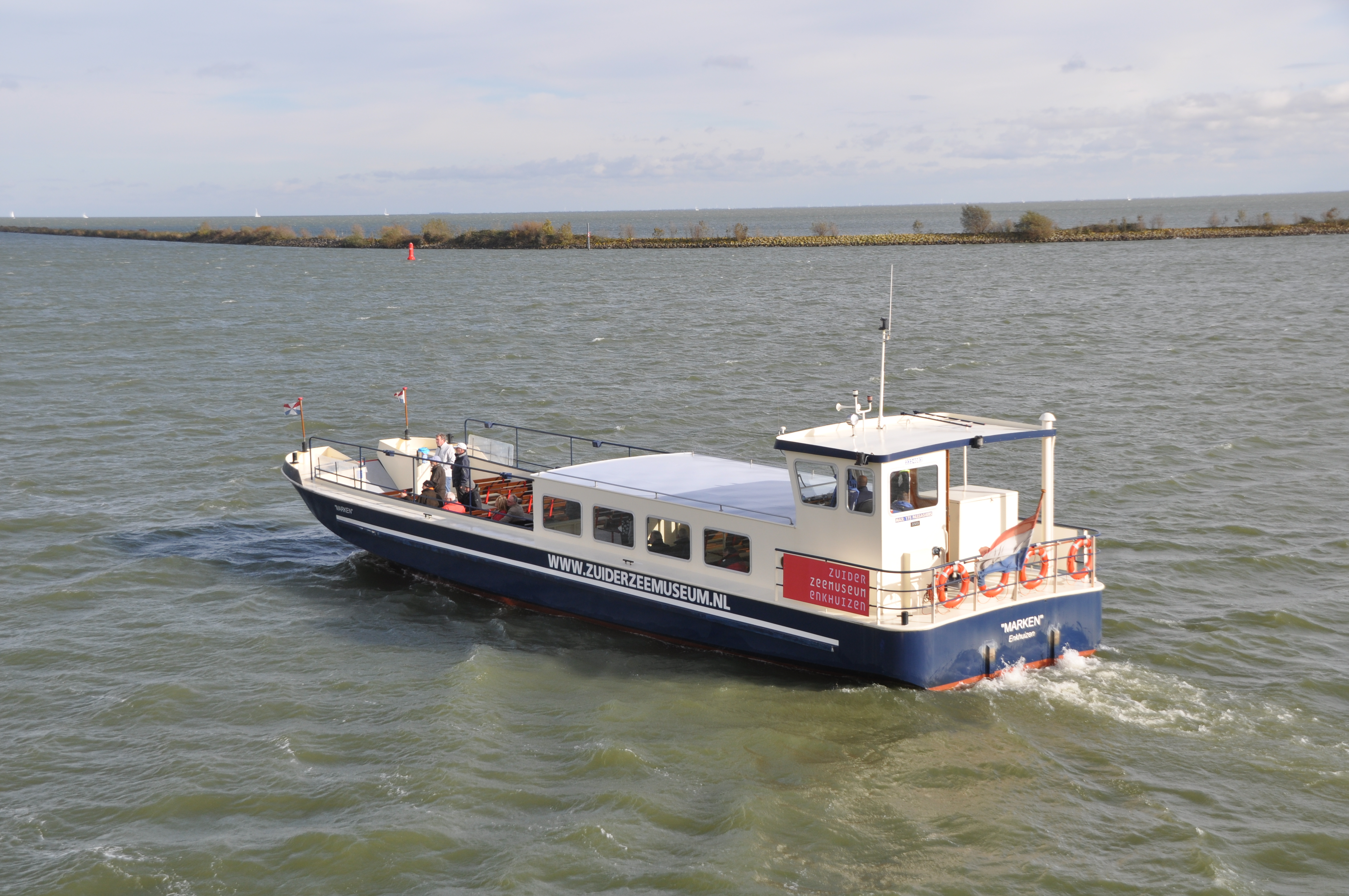 De MARKEN van het Zuiderzeemuseum in Enkhuizen